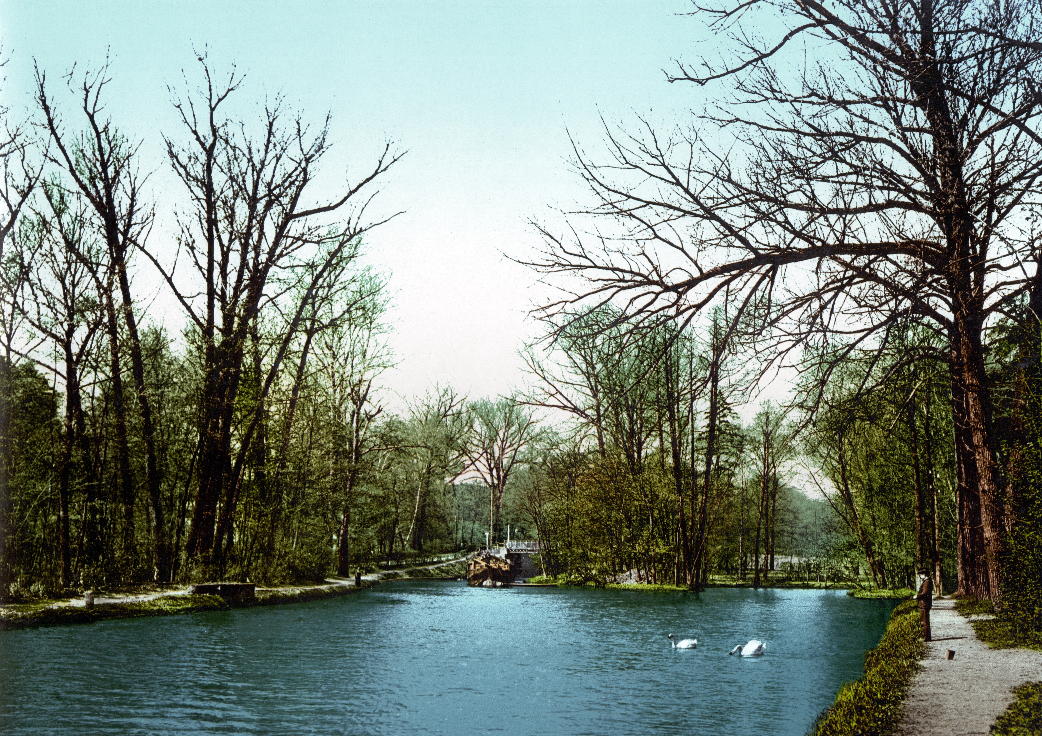 Bromberg